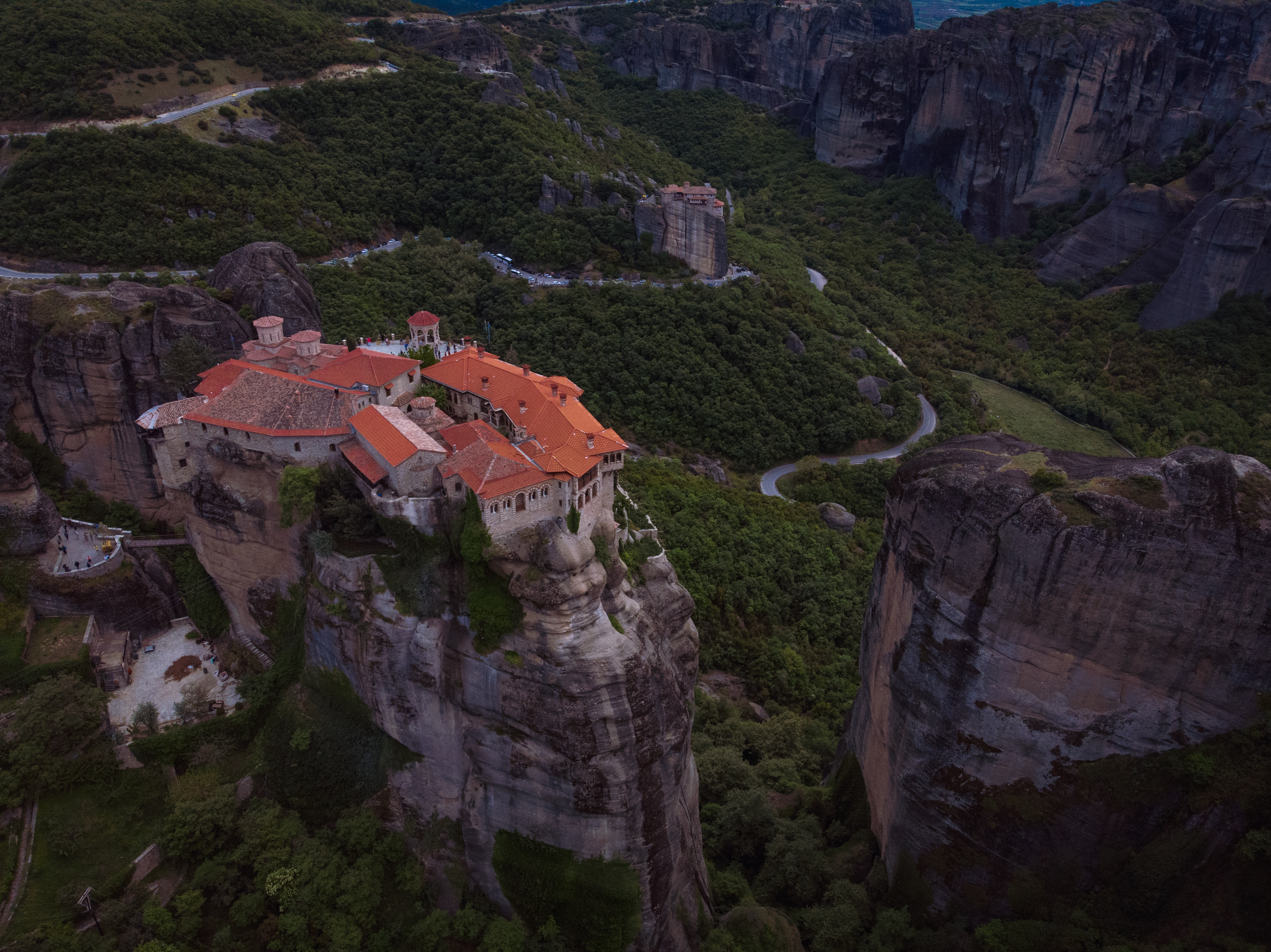 Είναι Πολύ εντυπωσιακό να πετάς ψηλά και να βλέπεις τα μοναστήρια χτισμένα στην κορυφή των βράχων. This is a photography of Natura 2000 protected area with ID GR1440003